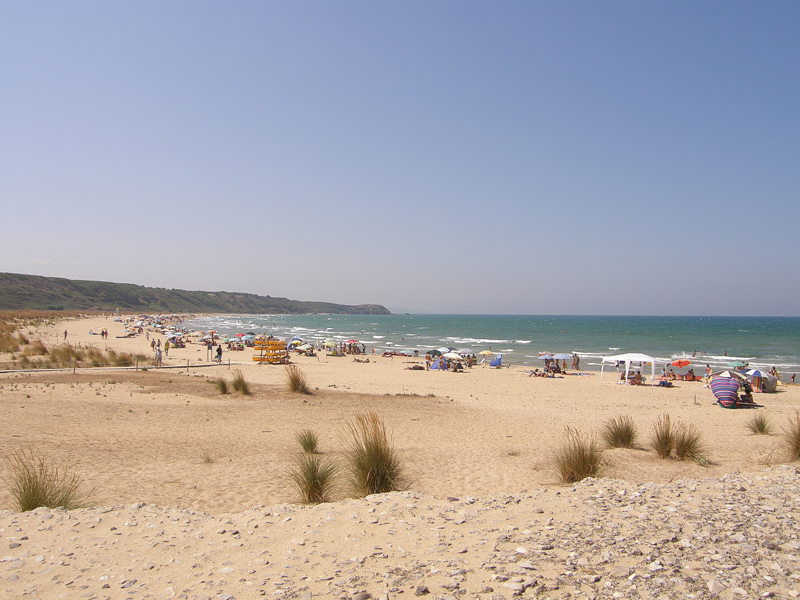 Vasto